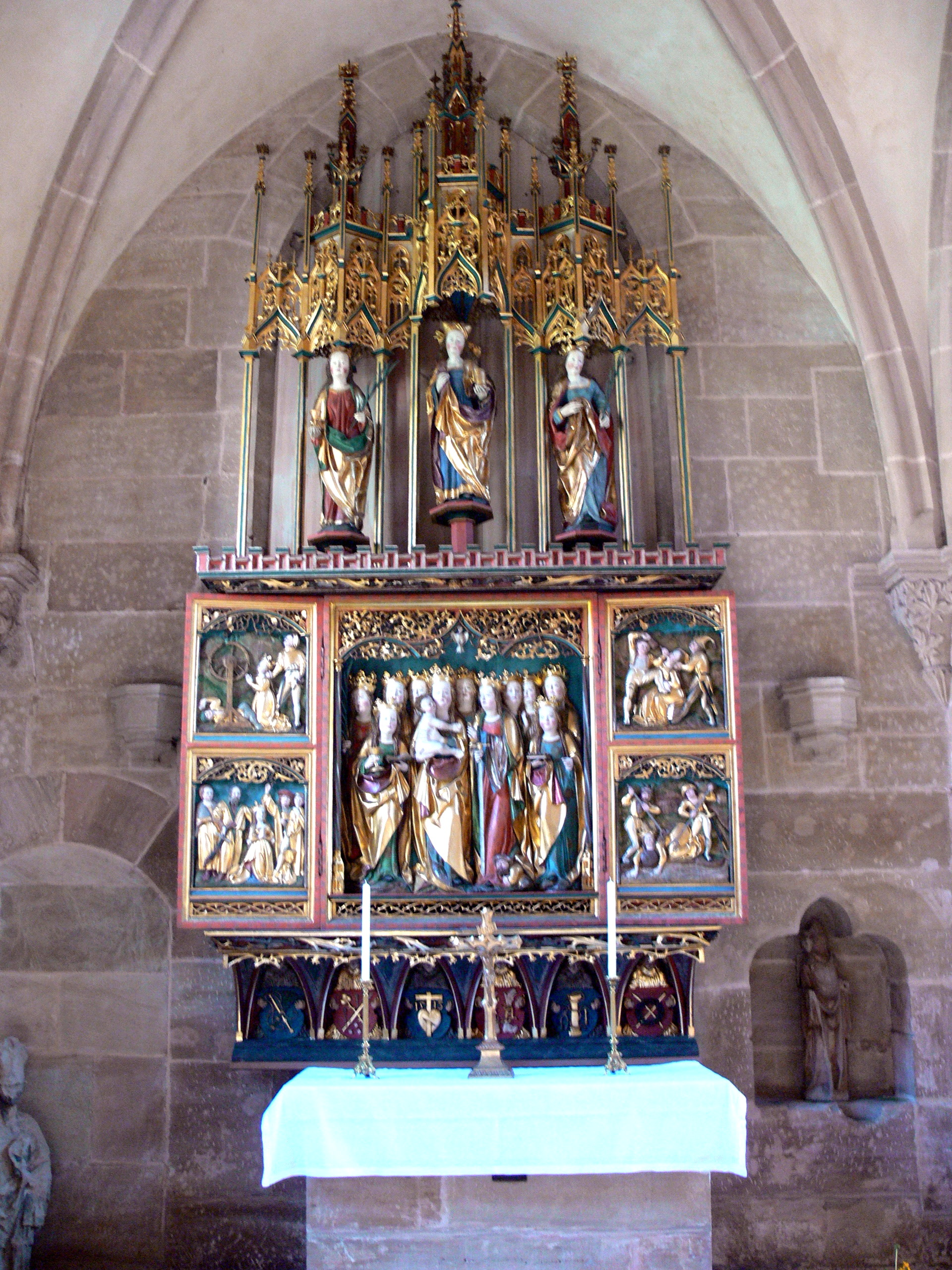 Münster in Heilsbronn. 11.000-Jungfrauen-Altar ( 1513 )